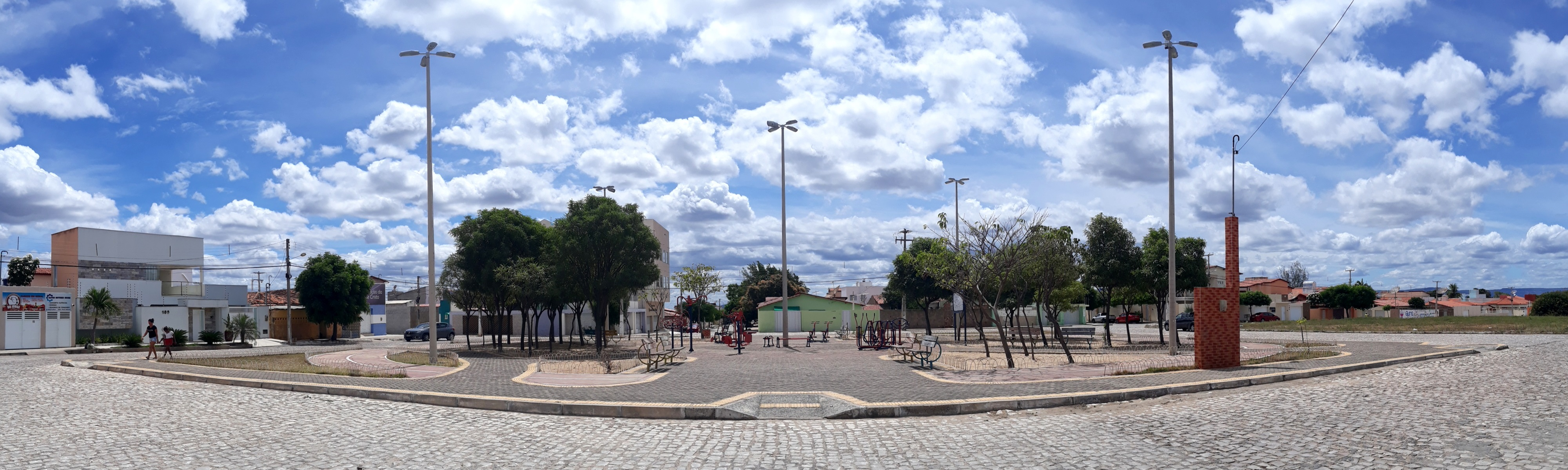 Praça Adalberto Henrique da Cunha, no conjunto Princesinha do Oeste em Pau dos Ferros, no Rio Grande do Norte (Brasil). No lado direito da imagem se localizava o Ginásio de Esportes Professor João Faustino, demolido em 2012.